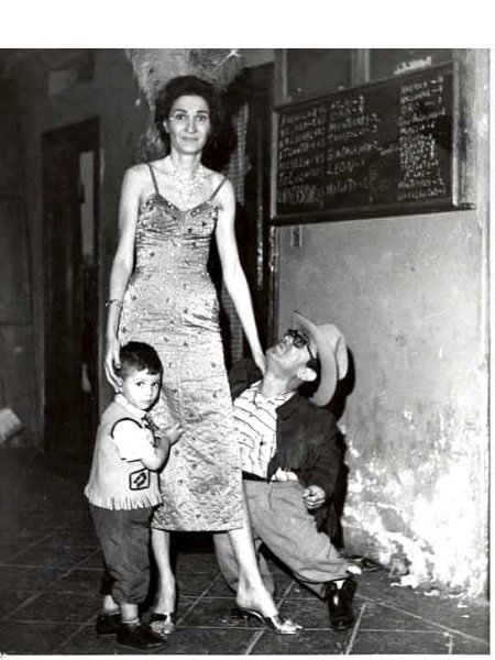 Die in Kanada geborene und in Mexiko lebende Schauspielerin und Komödiantin Vitola (1924-2009), eigenlich Fannie Kauffman und der mexikanische Schauspieler El Enano Santanón (1929–2002), eigentlich Rafael Muñoz Andrete.